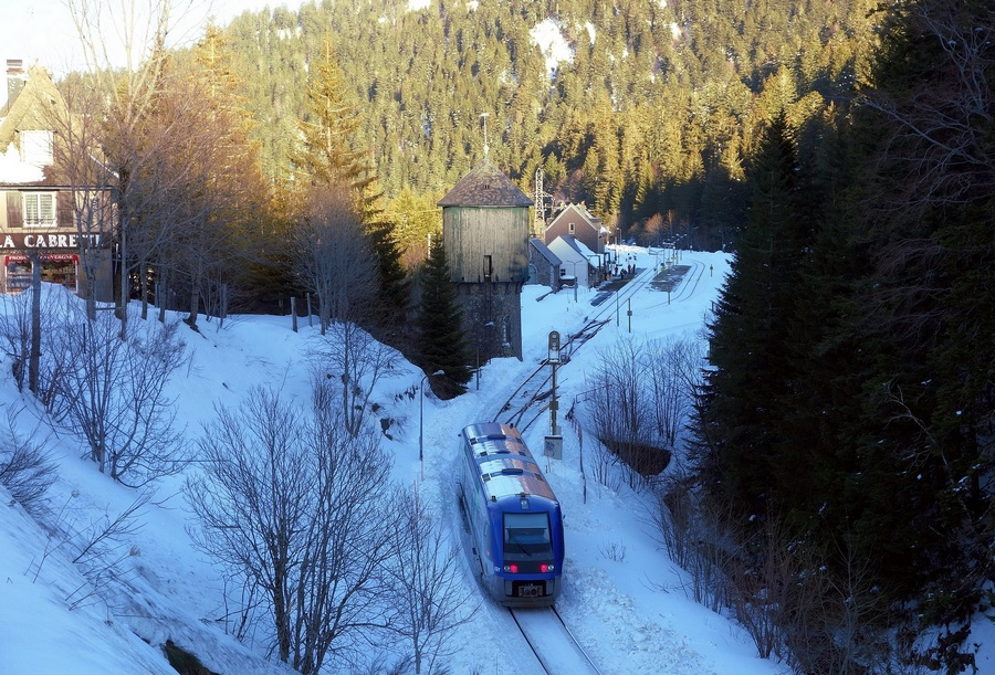 Arrivée d'une automotrice en gare du Lioran en hiver